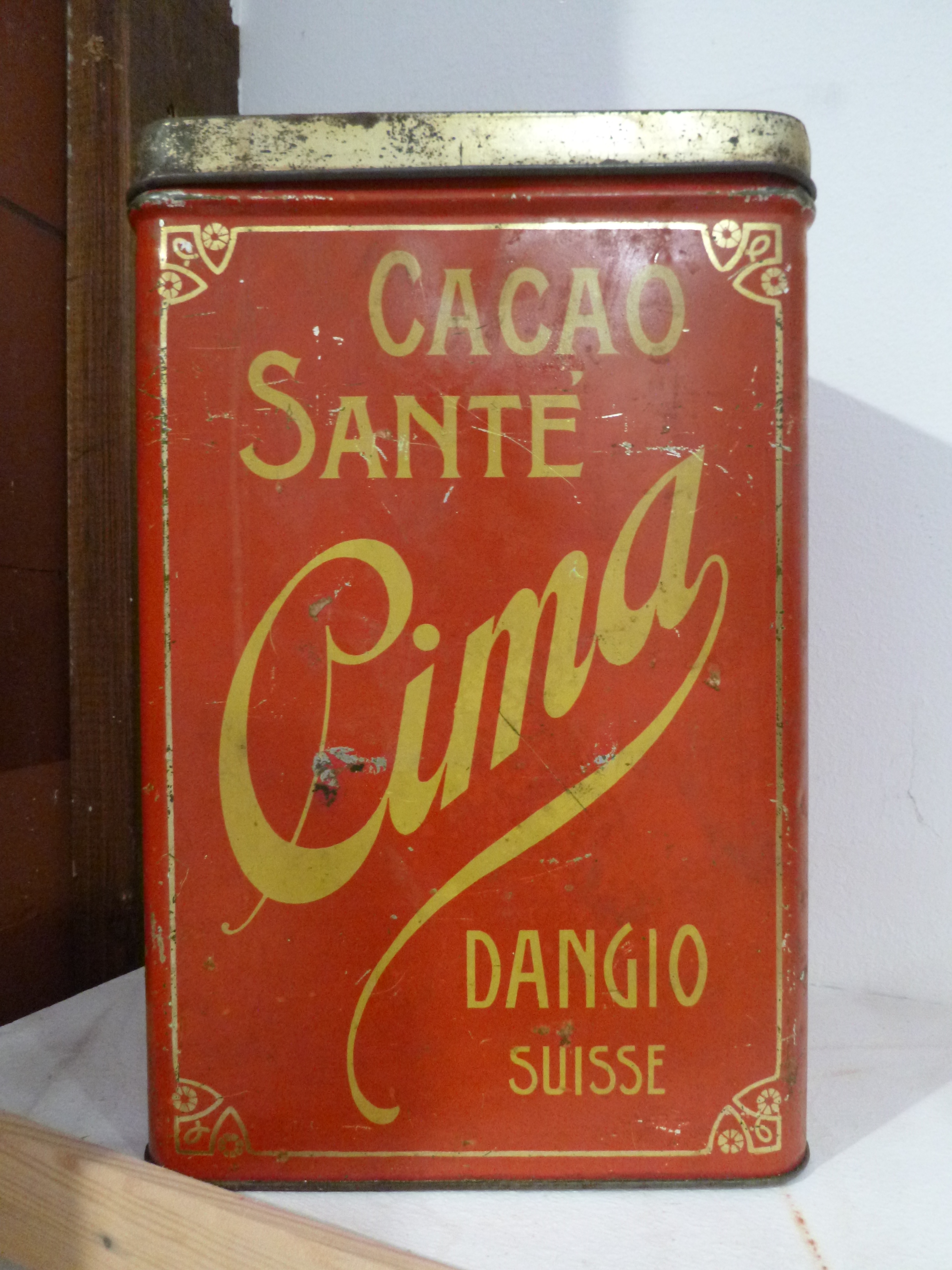 Schokoladenpulverdose der Cima-Norma in Dangio-Torre, Schweiz.